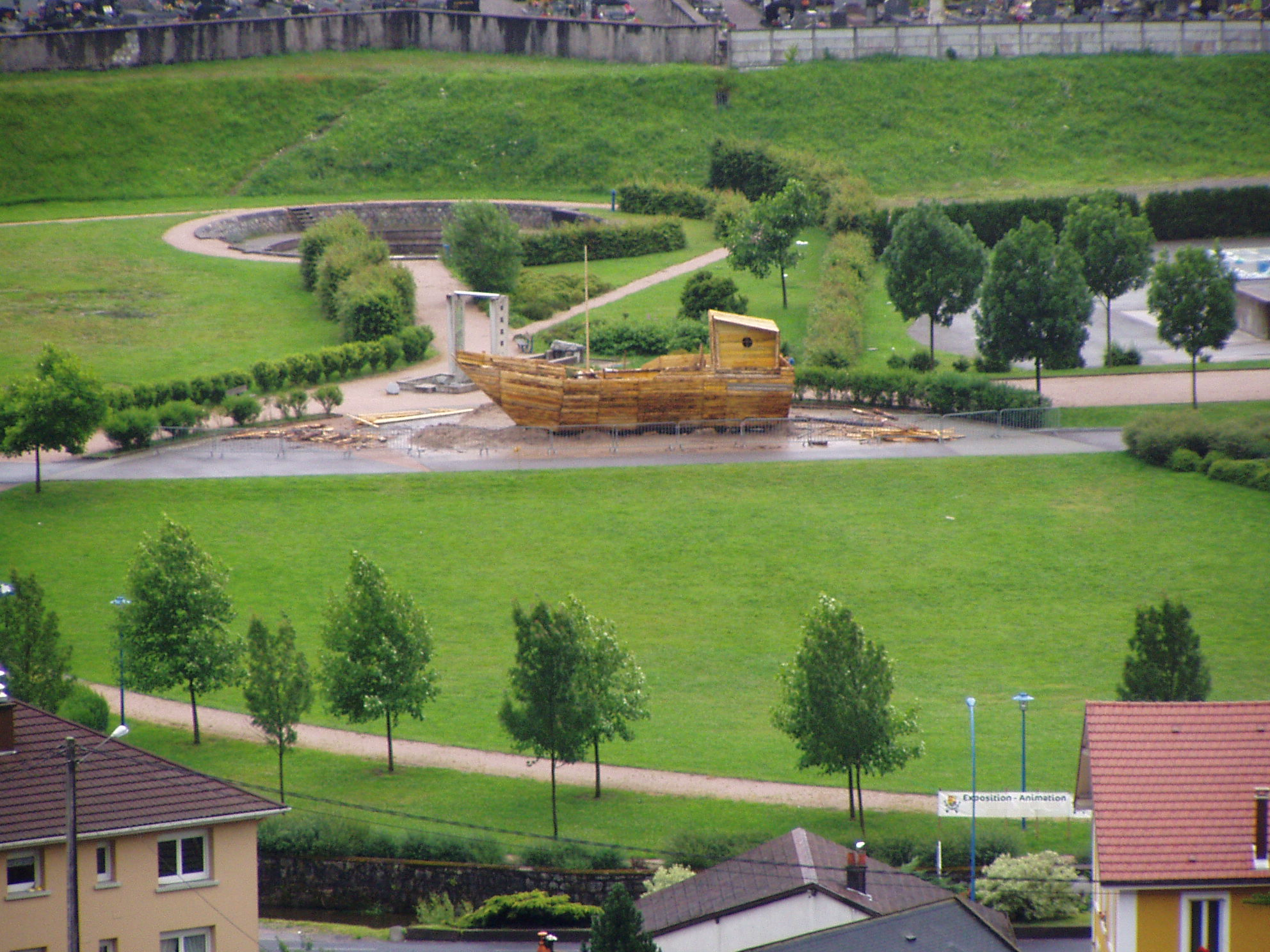 préparation pour le feu de la Saint Jean à Bussang